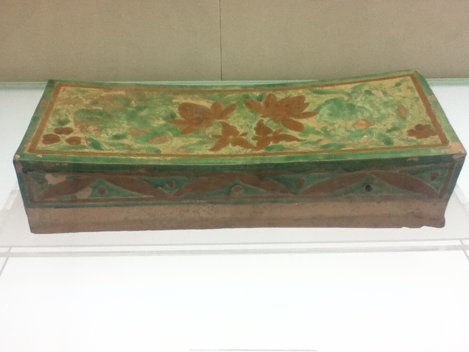 文言: 黃綠釉長方枕，金朝，藏於山西省博物院